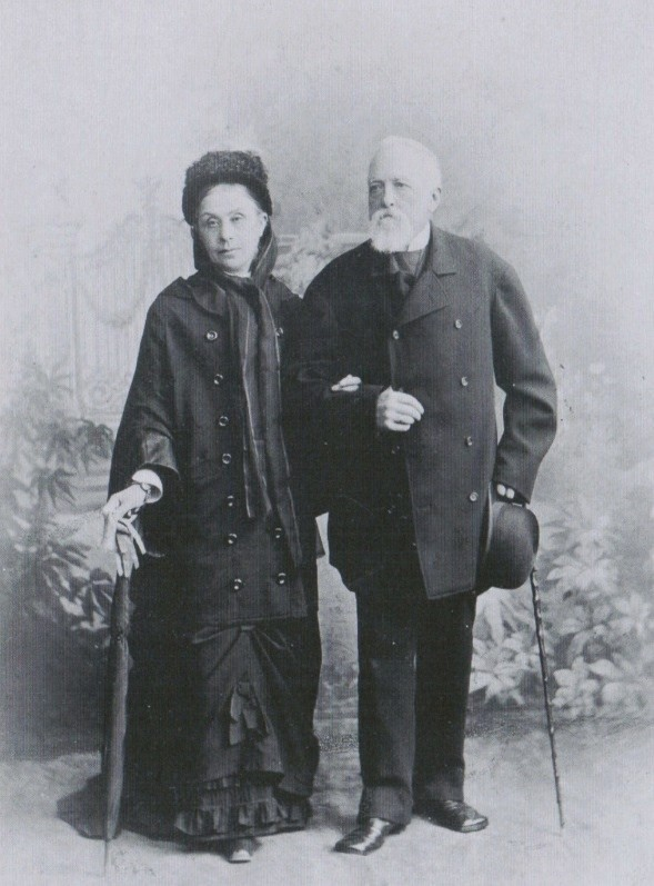 Князь Григорий Григорьевич Гагарин (1810—1893) с женой княгиней Софьей Андреевной, ур. Дашковой (1822—1908)